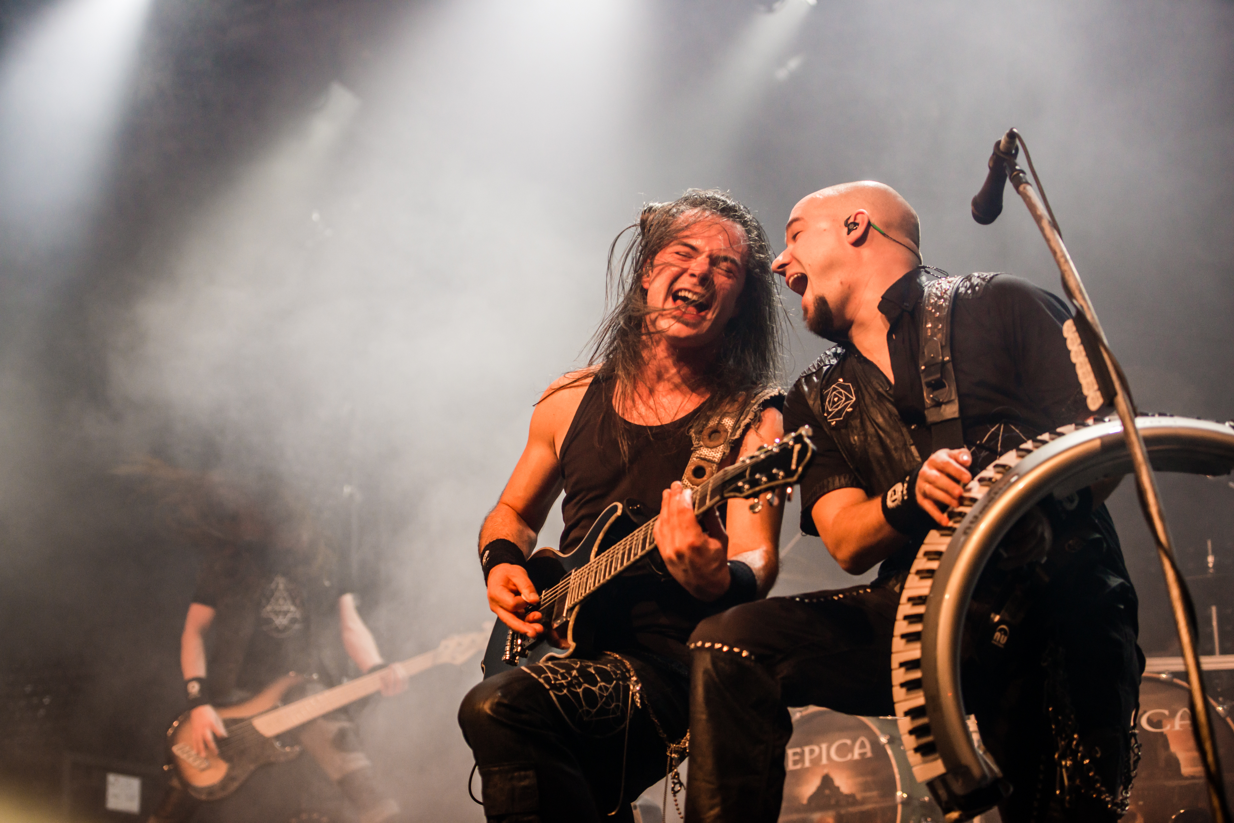 'Epica - Epic Metal Fest - Eindhoven'